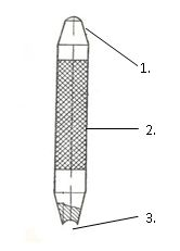 Căpuitor/Contracăpuitor:1. Cap principal 2. Tub de oțel 3. Scobitură sferică